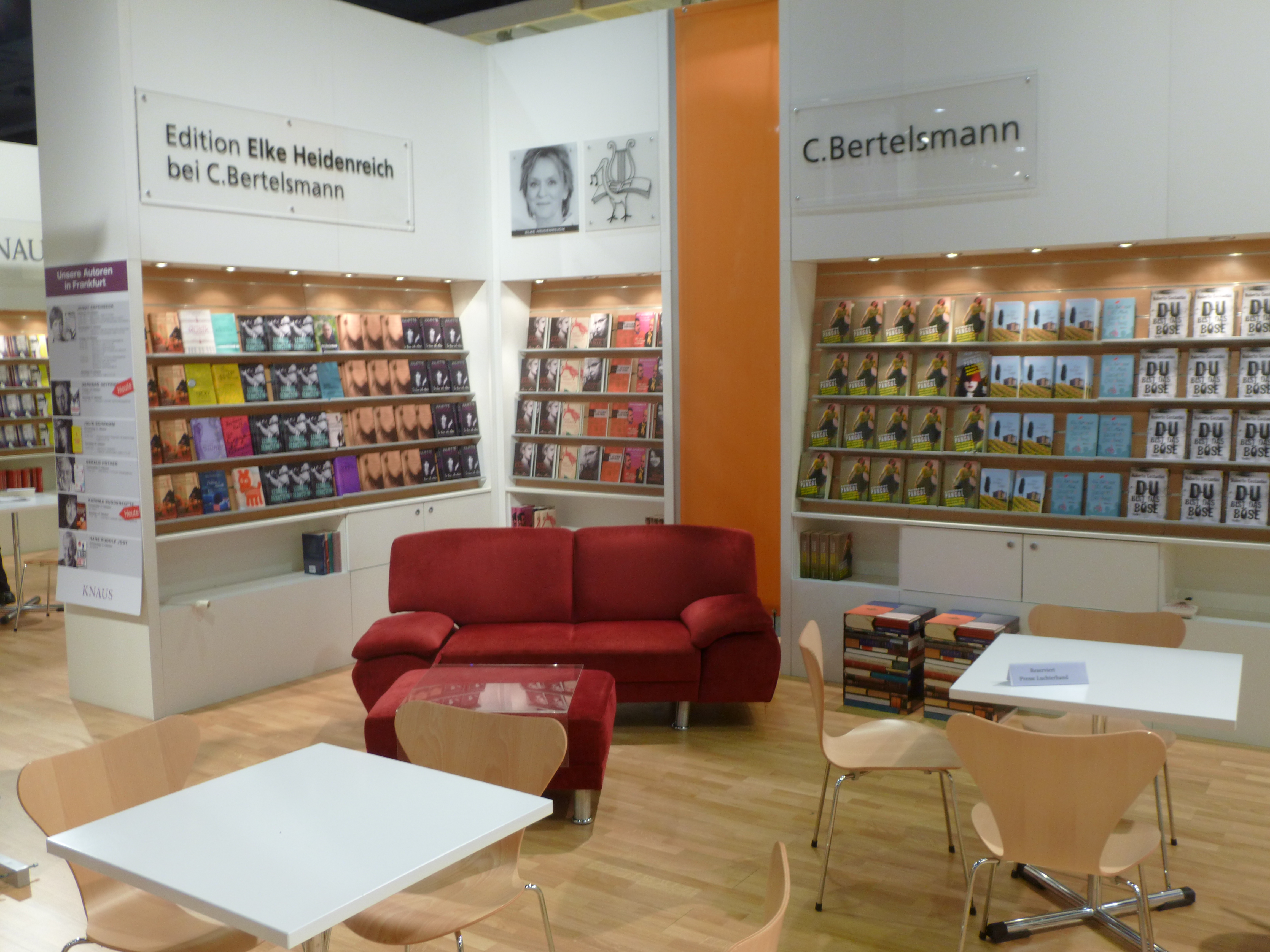 stando de la eldonejo C. Bertelsmann en la Frankfurta librofoiro 2012